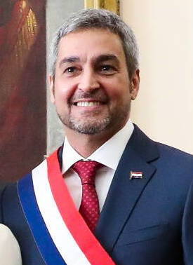 El presidente de Paraguay, Mario Abdo Benítez, el día de su asunción.